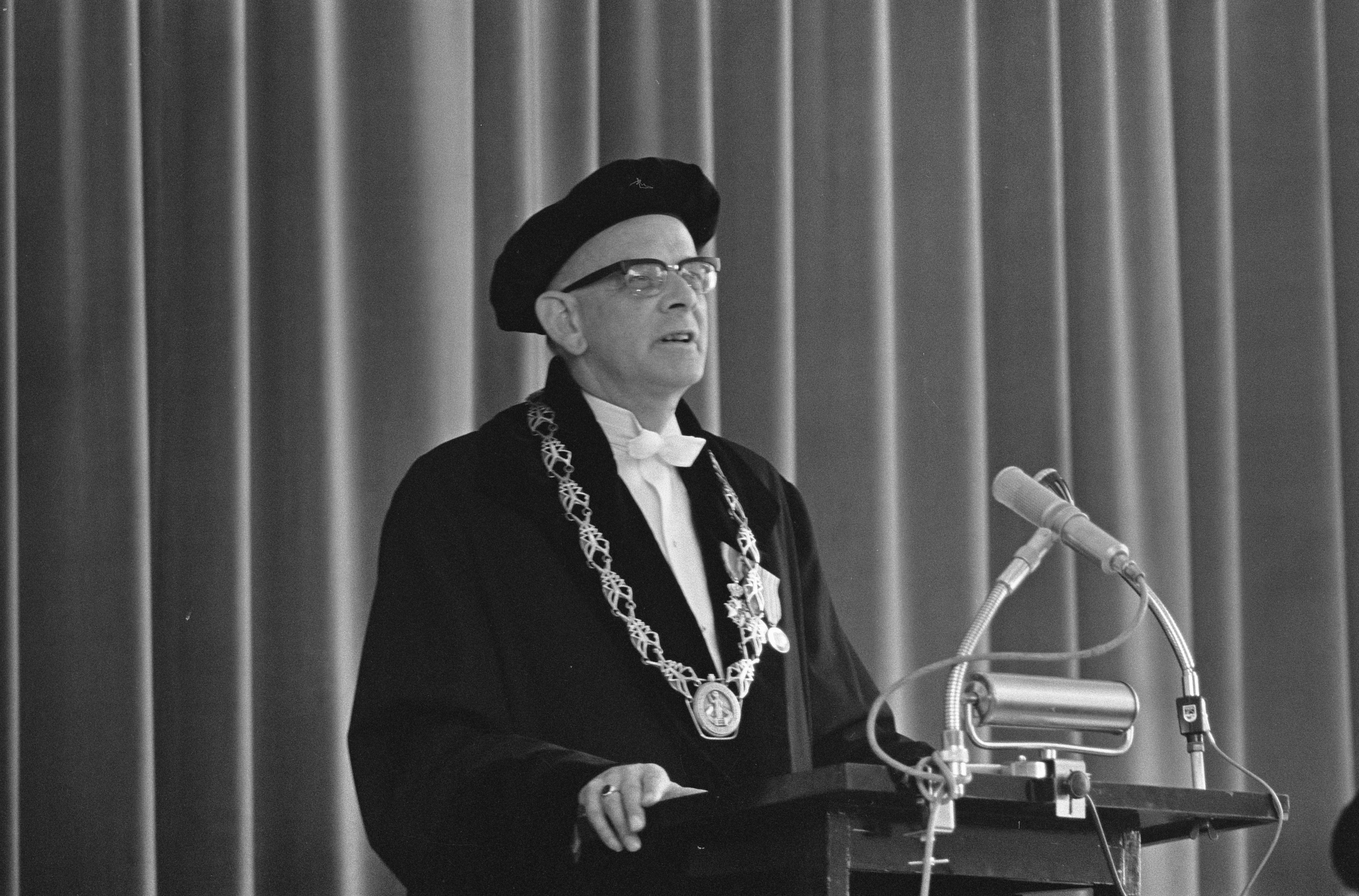 Rector Magnificus mr. W.F. de Gaay Fortman tijdens zijn openingsspeech